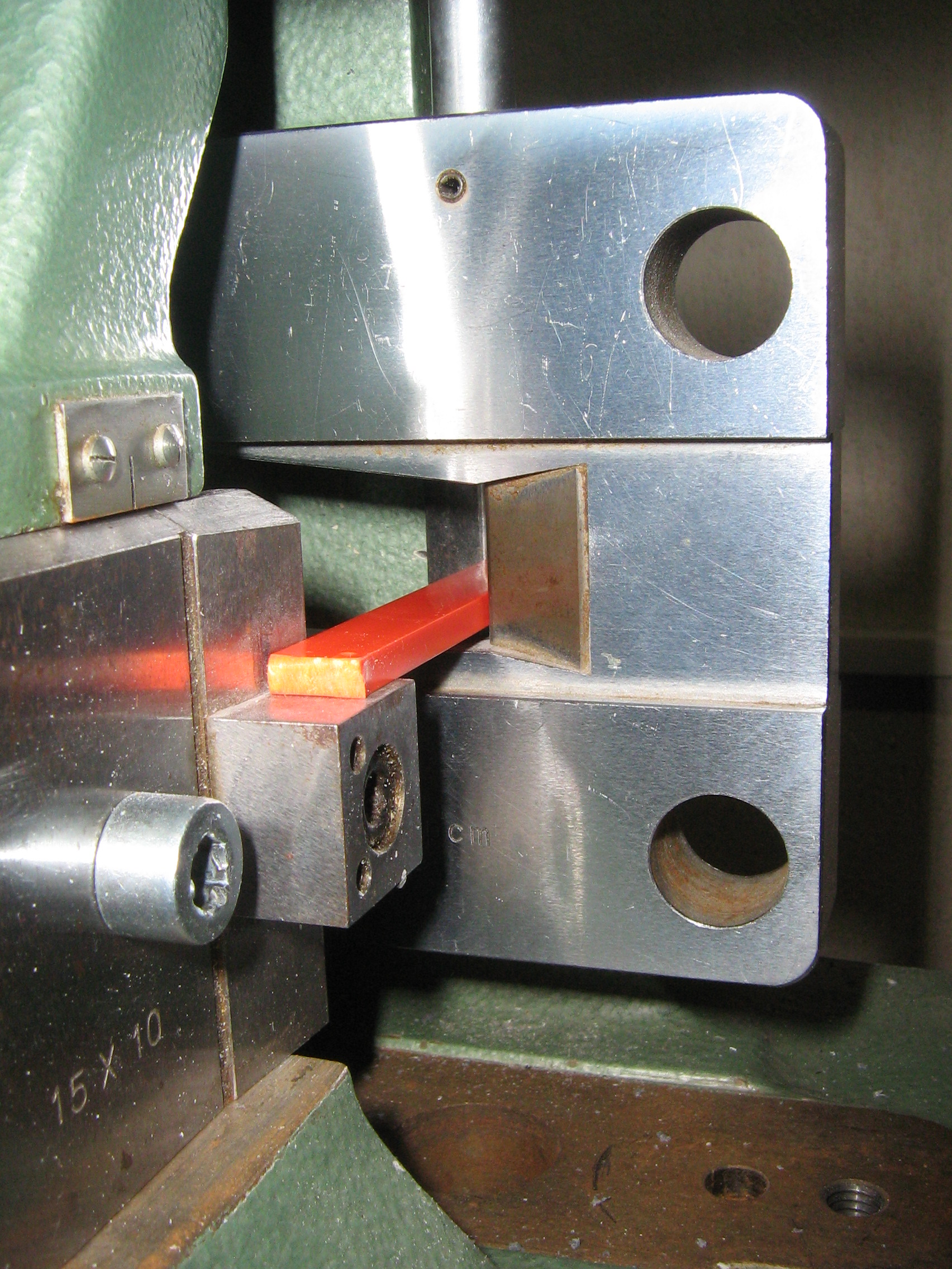 Probenhalterung und Schlagpendel für Charpy-Kerbschlagprüfung